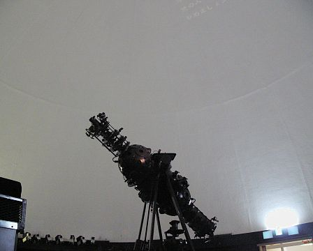 千葉市立郷土博物館の4階にあるプラネタリウム内部。2005年2月6日Skink撮影。